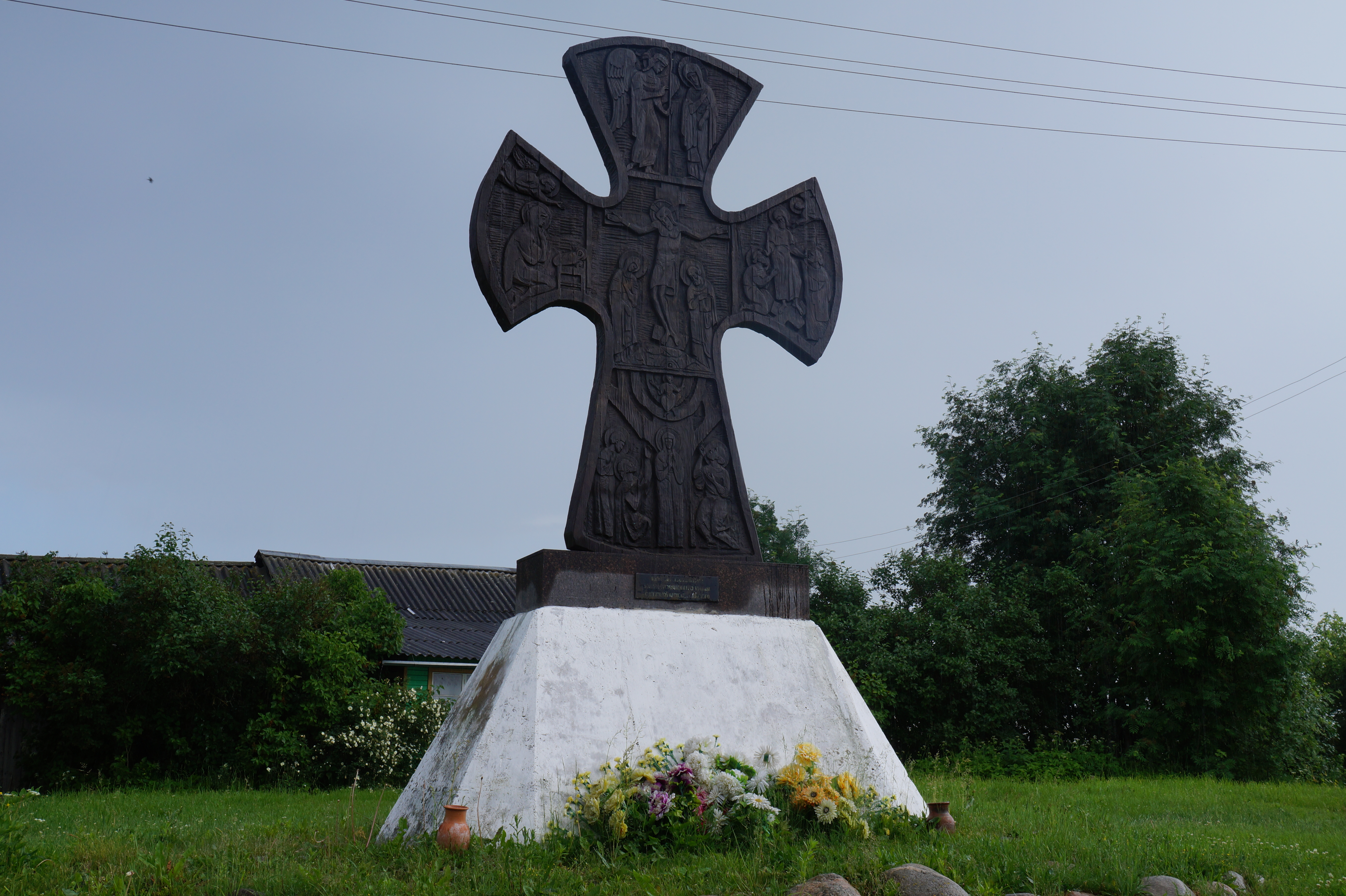 Комплекс "Ледовое побоище" (Псковская область, Гдов, деревни Кола, Кобылье городище, Самолва; п-ов Самолва, северное побережье Чудского озера)